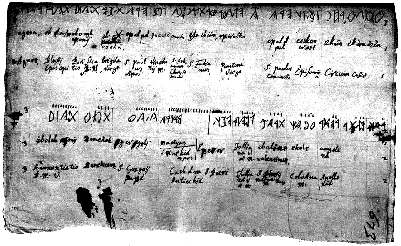 Marsigli 1690-ben eljutott Székelyföldre is, ahol kezébe került egy botnaptár. E botnaptár teljes szövegét lemásoltatta, és egy székely aláírásával hitelesítette, amely megtalálható a Bolognai Egyetemi Könyvtárban az 54. kötet 669. oldalán. A botnaptár azóta - mint oly sok minden - eltűnt, de Marsiglinek köszönhető, hogy másolatban megmaradt. Mai ismeretünk szerint ez a legterjedelmesebb rovásemlékünk.